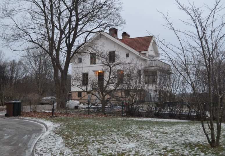 Örgryte gamla prästgård (fastighetsbeteckning LUNDEN 70:1), bostadshus vid Prästgårdsgatan 44A från 1880-talet, foto taget februari 2018.